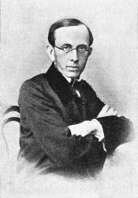 Портрет К. П. Победоносцева из книги «Государственная Канцелярия» (1910)